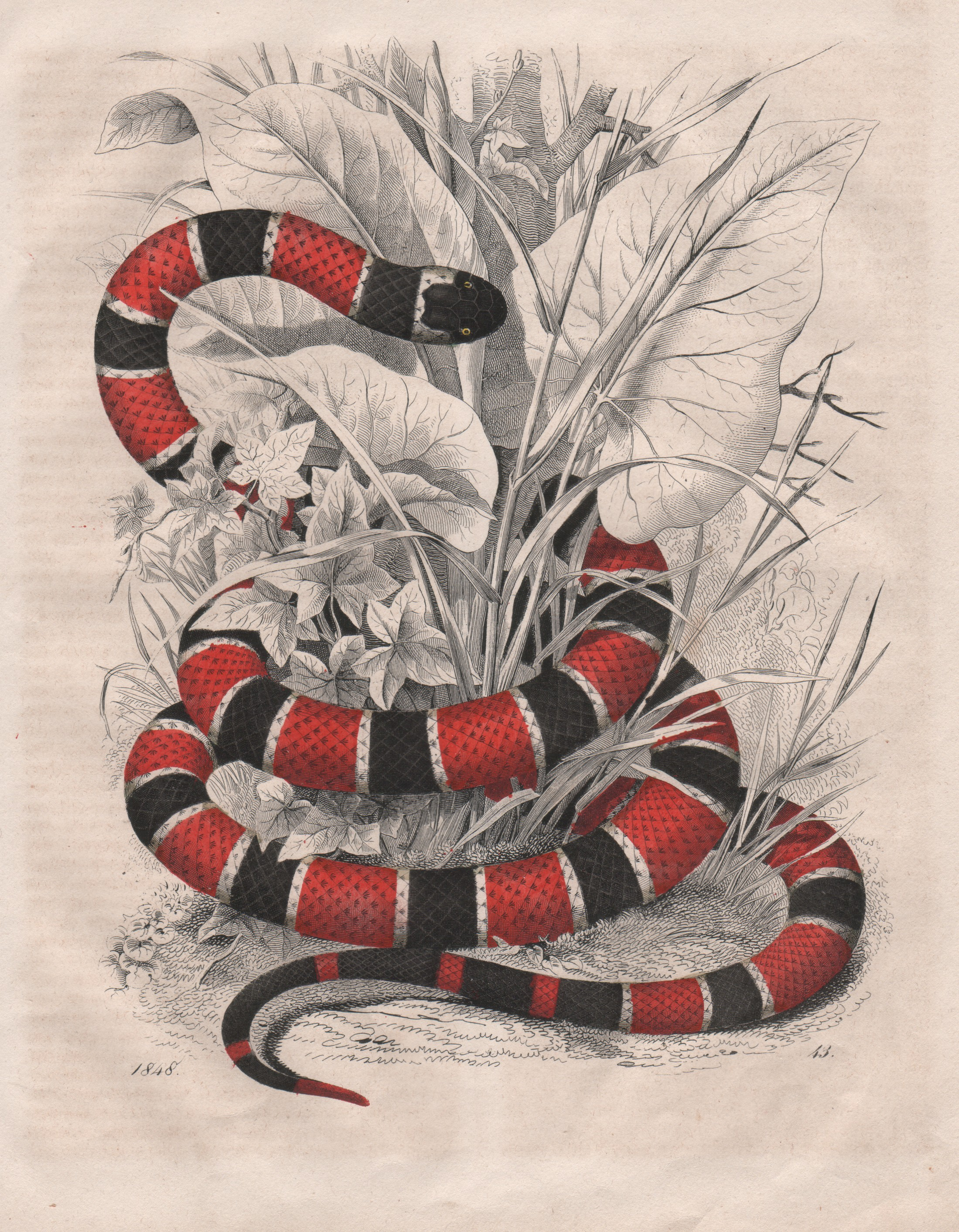 Lithografie mit historischer Darstellung einer Korallenotter